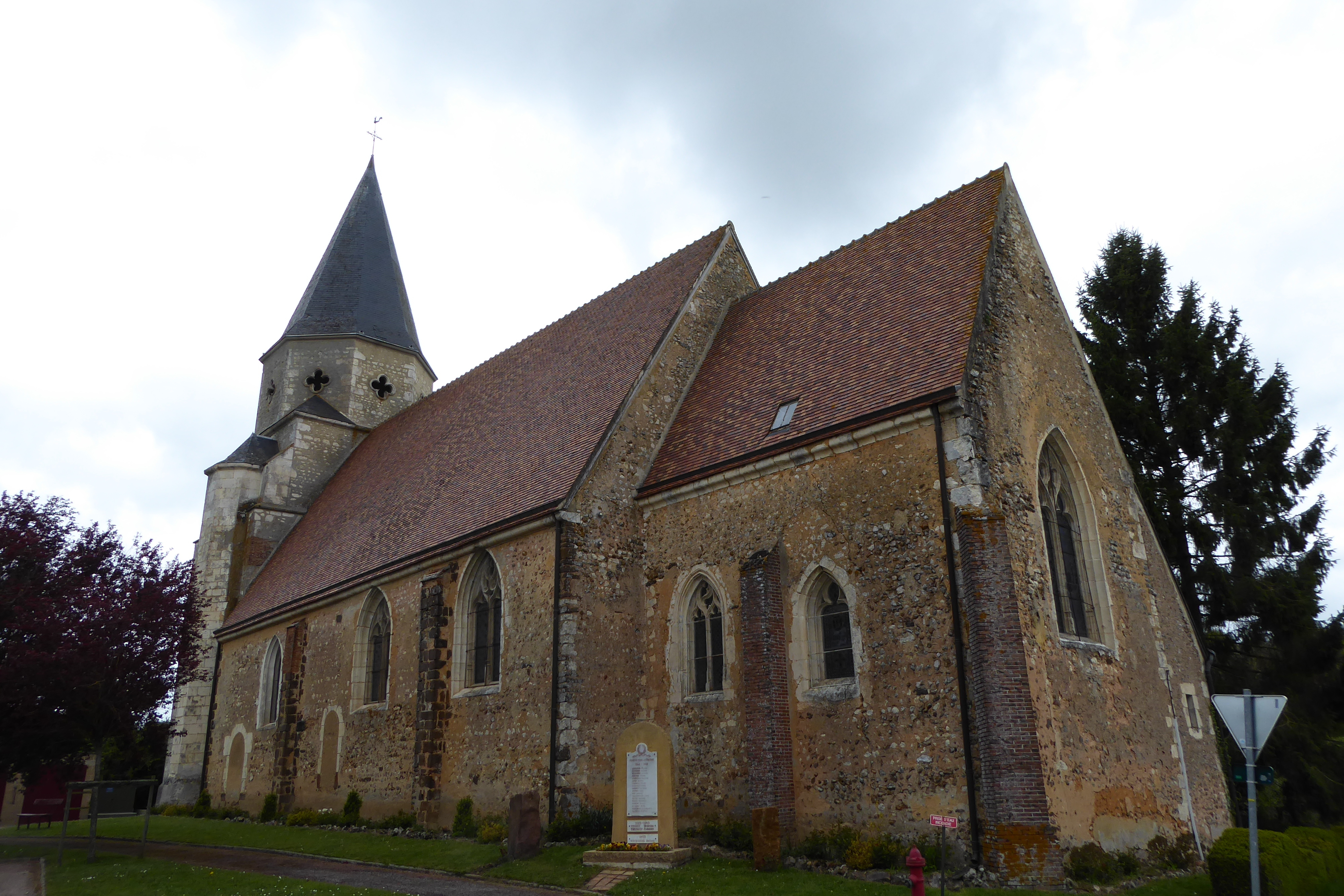 église Saint-Vincent, Marolles-les-Buis, Eure-et-Loir (France).